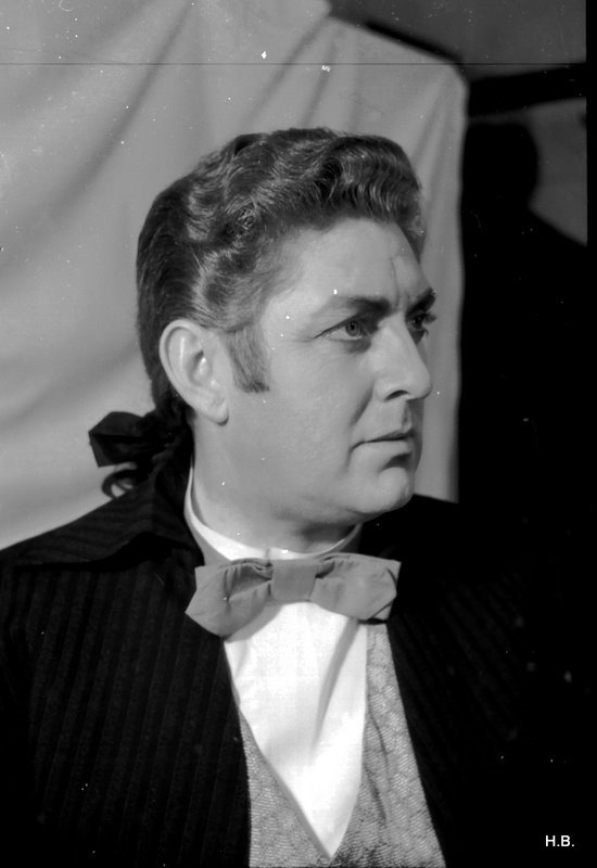 Anton de Ridder (Amsterdam, 13 februari 1929 – Dettenheim (Duitsland), 9 juli 2006) was een Nederlandse lyrische tenor. Afbeelding is een scan door de rechthebbende van een foto.